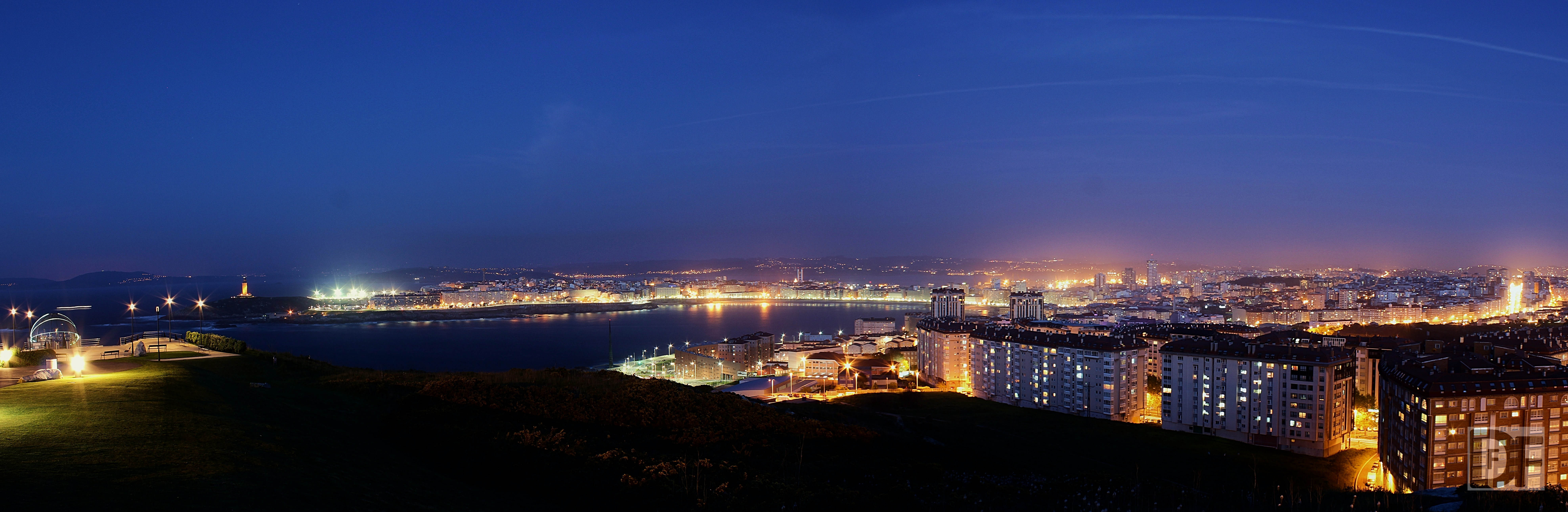 Panoramica A Coruña desde San Pedro